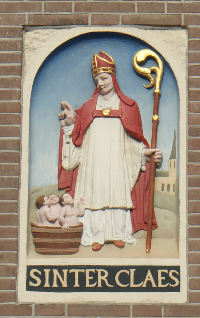 Steen met Sinterclaes bij huis aan de Dam te Amsterdam